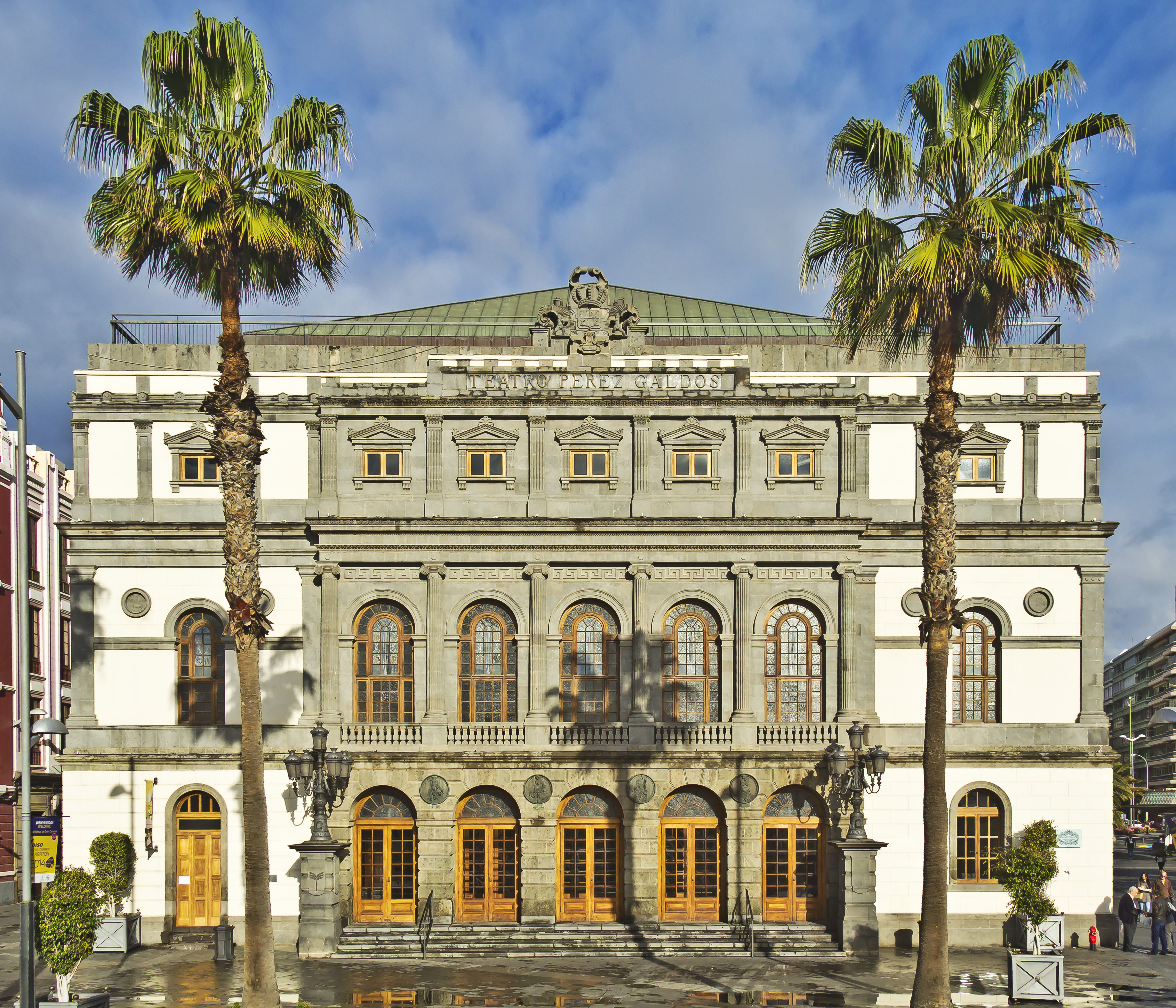 Hauptfassade des Teatro Pérez Galdós in Las Palmas de Gran Canaria